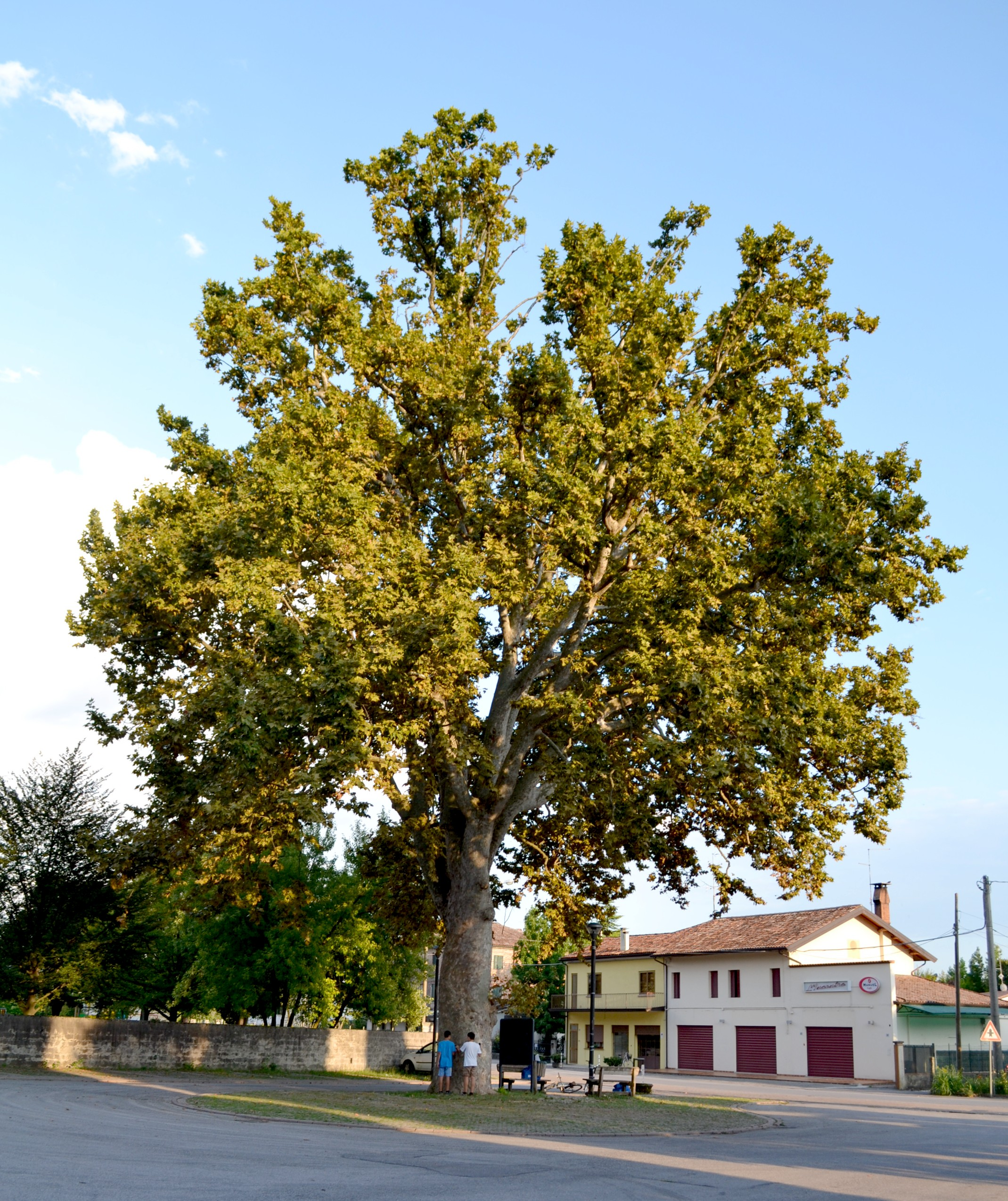 Platano monumentale, presso chiesa di S. Andrea, Codognè (Tv)